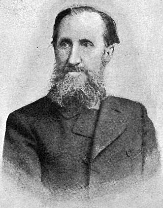 Герье, Владимир Иванович (1837—1919), Vladimir Ivanovich Guerrier (1837—1919)